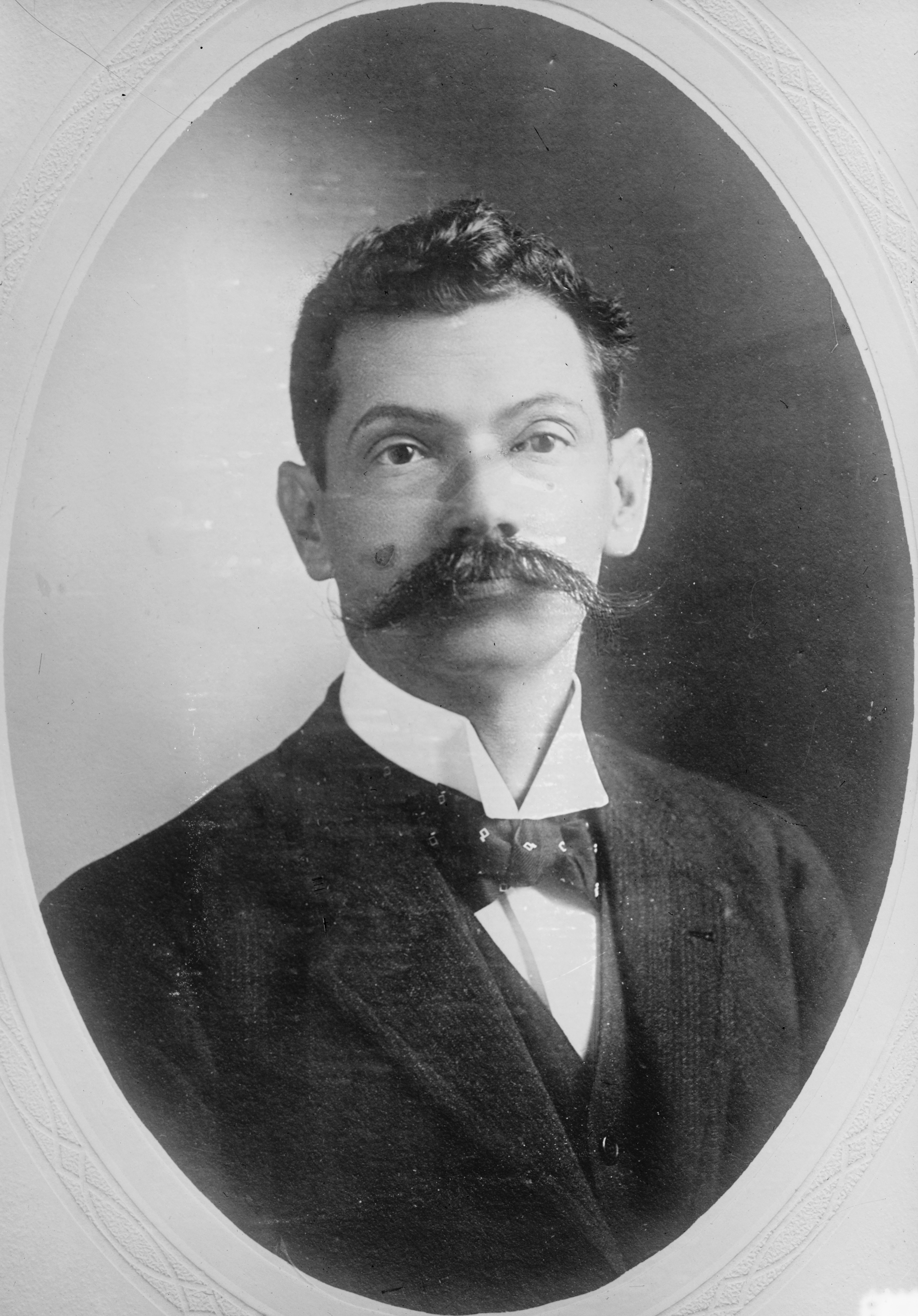 "Dr. Francisco Bertran, Pres. Honduras" (sic; Francisco Bertrand)